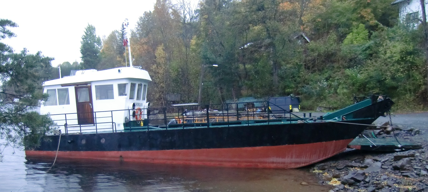 Norsk (bokmål): MS Thorbjørn ved Utøykaia